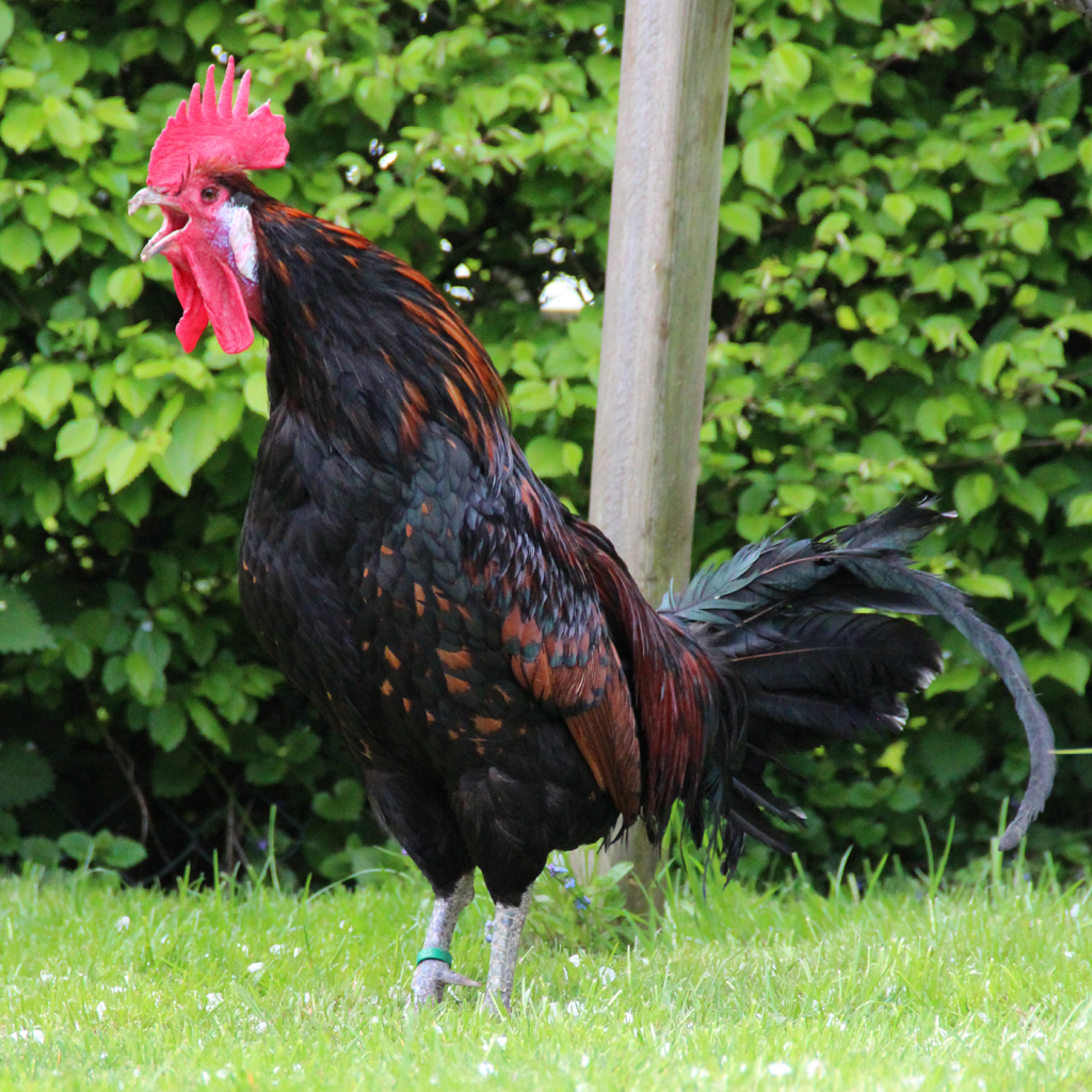 Canterino di montagna (gallo)